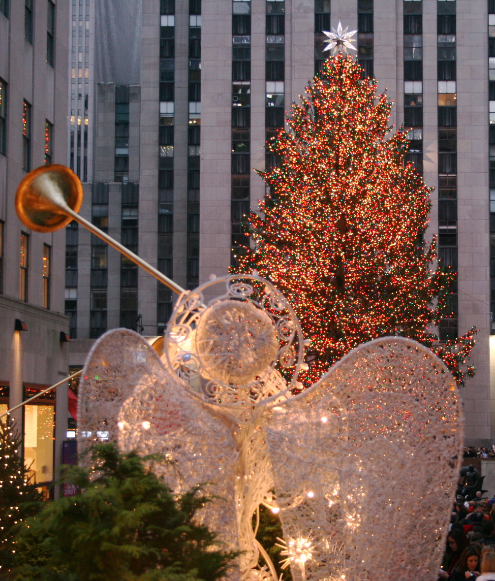 საშობაო ნაძვის ხე ნიუ-იორკში, როკფელერის მოედანზე, 2006. (ალსანდრო)